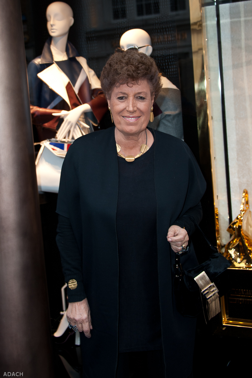 Fendi store opening - Carla Fendi